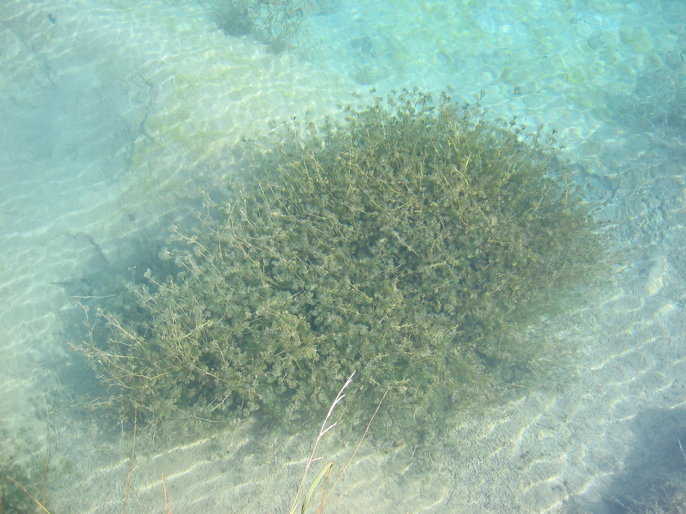 Vodna zlatica, in latin: “Batrachium sp.”